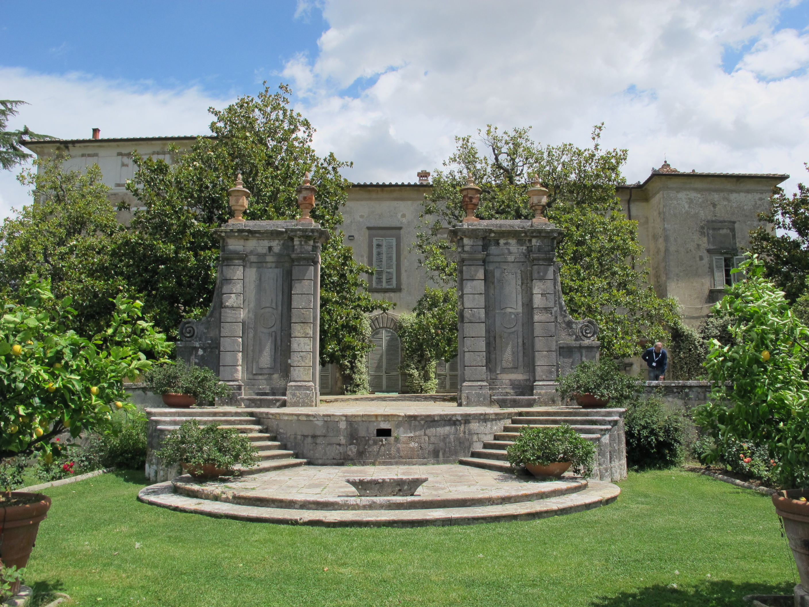 Villa la magia, giardino 04 scalinata a tenaglia